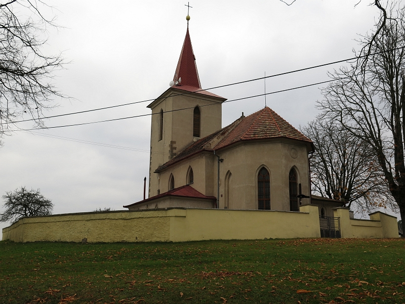 Kostel svatého Jana Křtitele, Vlkov nad Lesy.